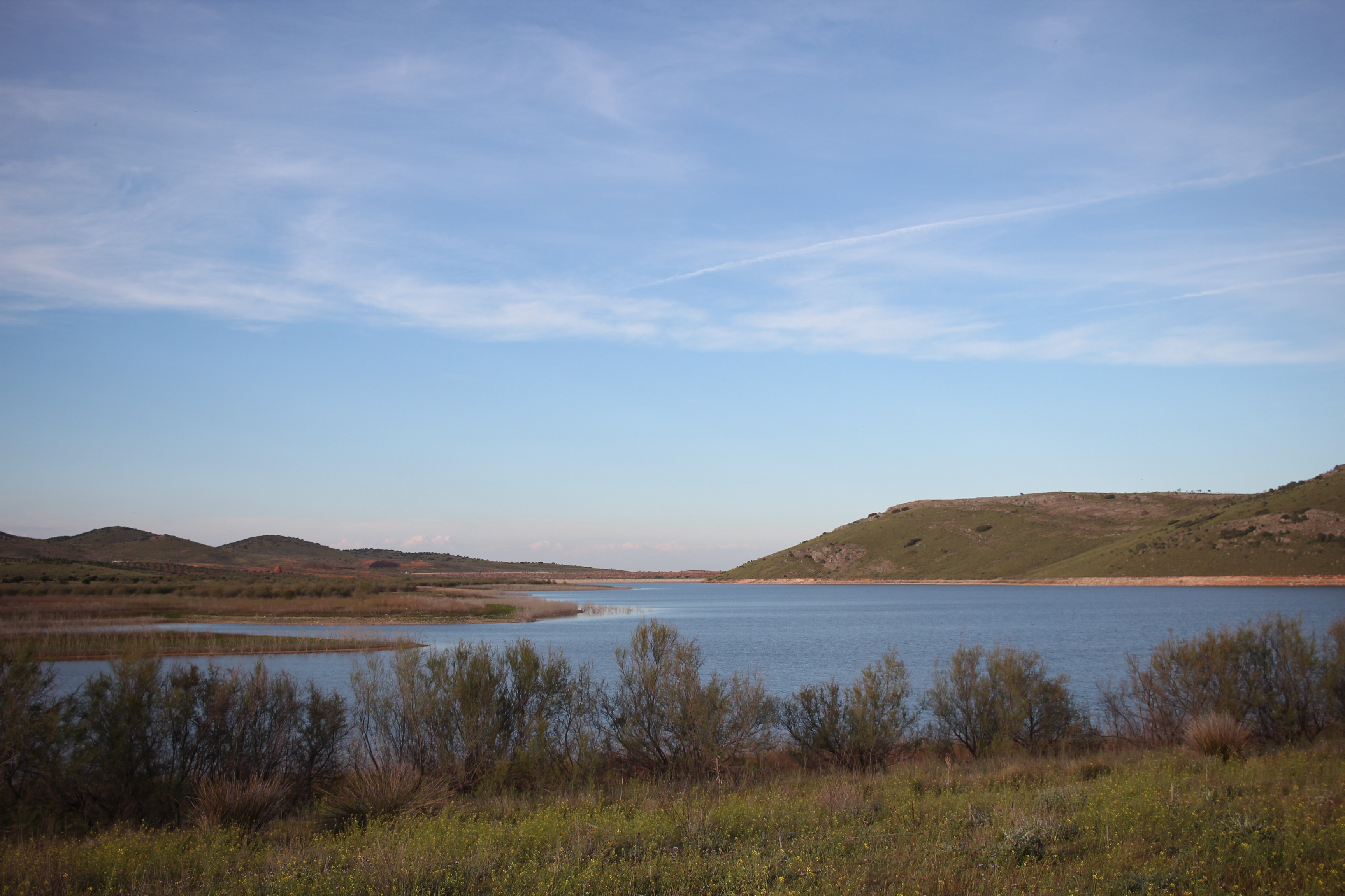 Vista de parte del embalse